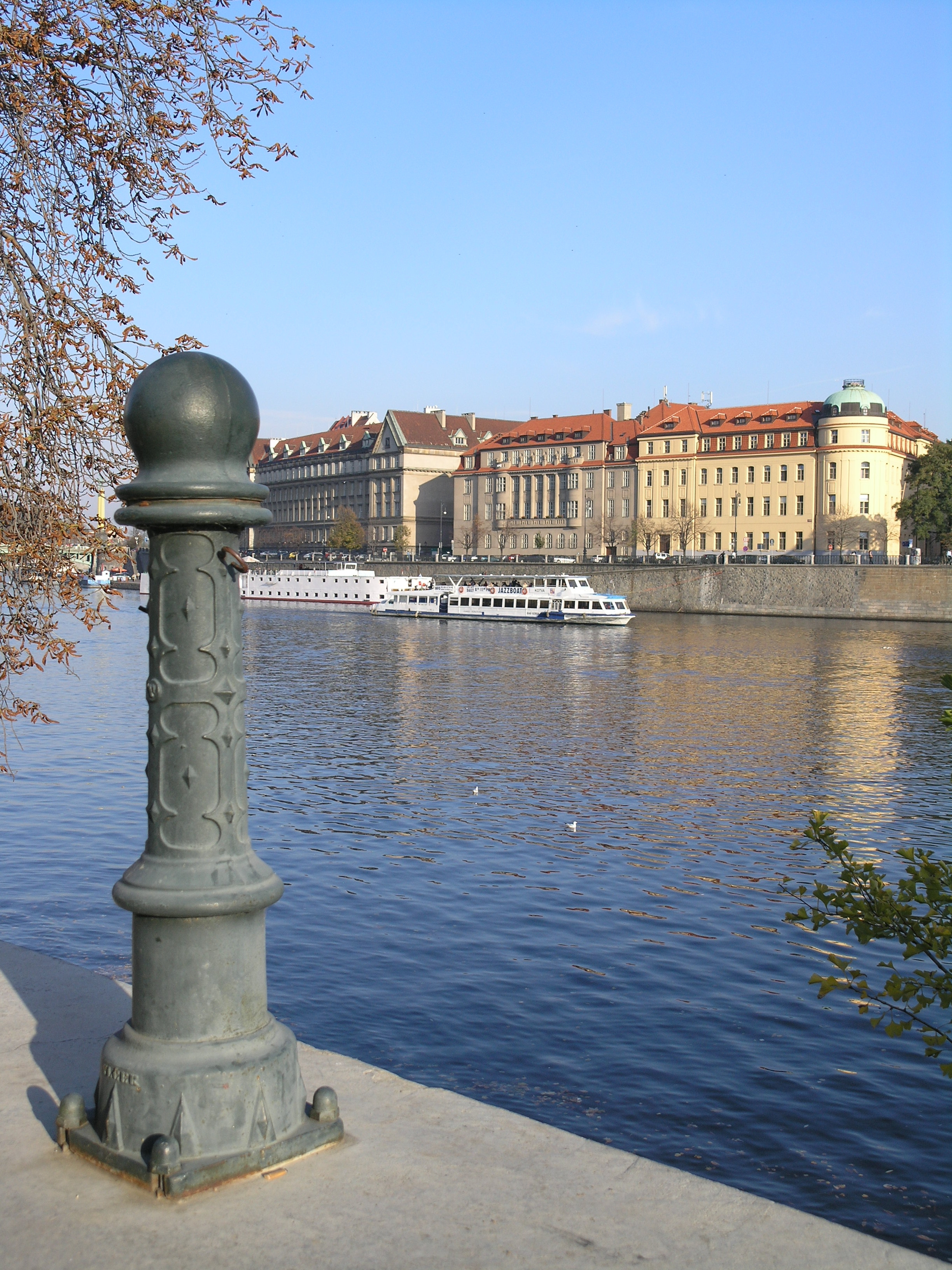 Praha, Malá Strana / Staré Město - Kosárkovo nábřeží, pohled přes Vltavu na Dvořákovo nábřeží